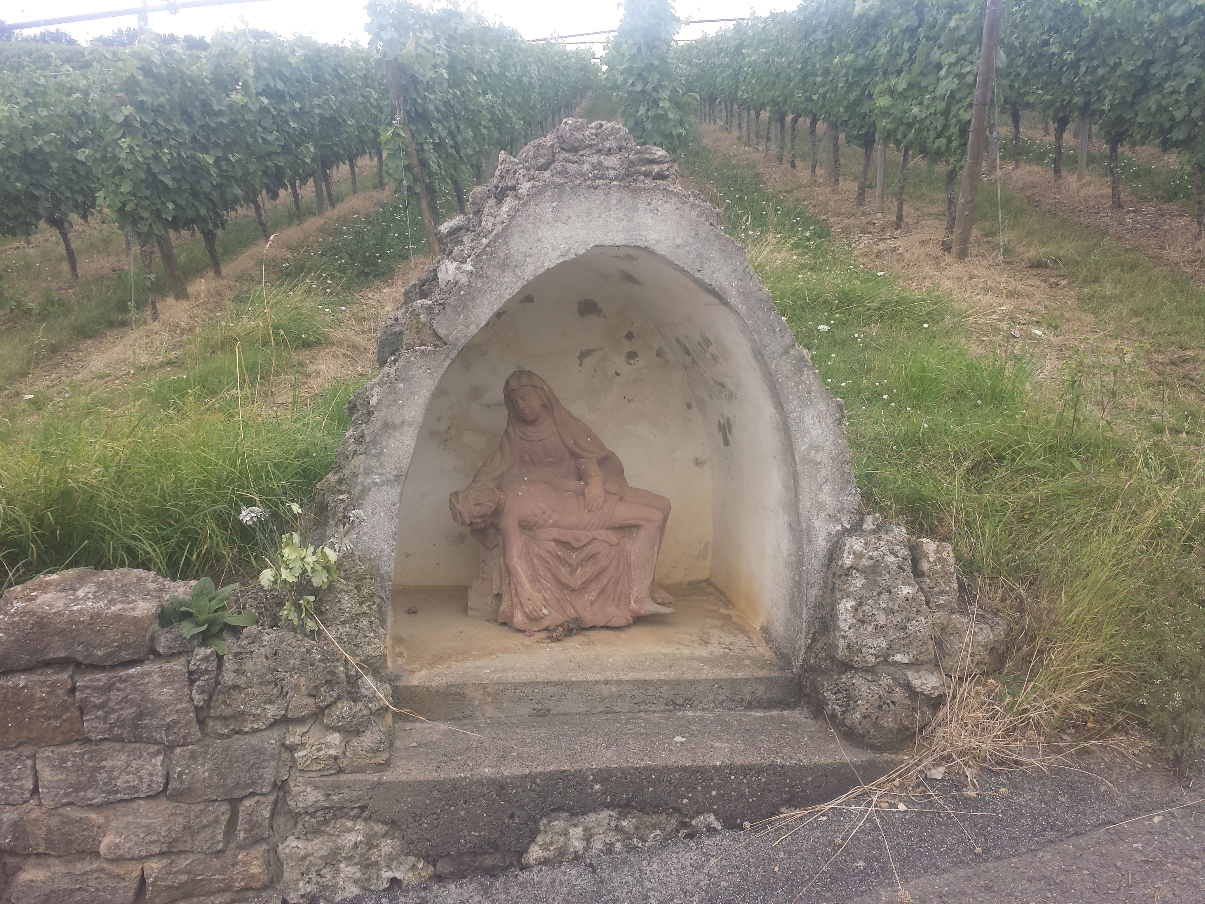 Jakobsweg Main-Taubertal, Bildstock am Wegrand bei Beckstein. Hier verläuft auch die LT 5 – Mountainbiketour Lauda-Königshofen – Westroute.